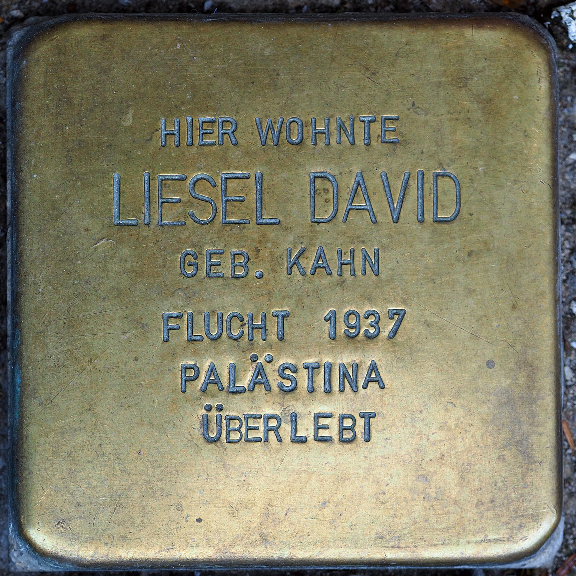 Stolpersteine Wesel: David, Liesel